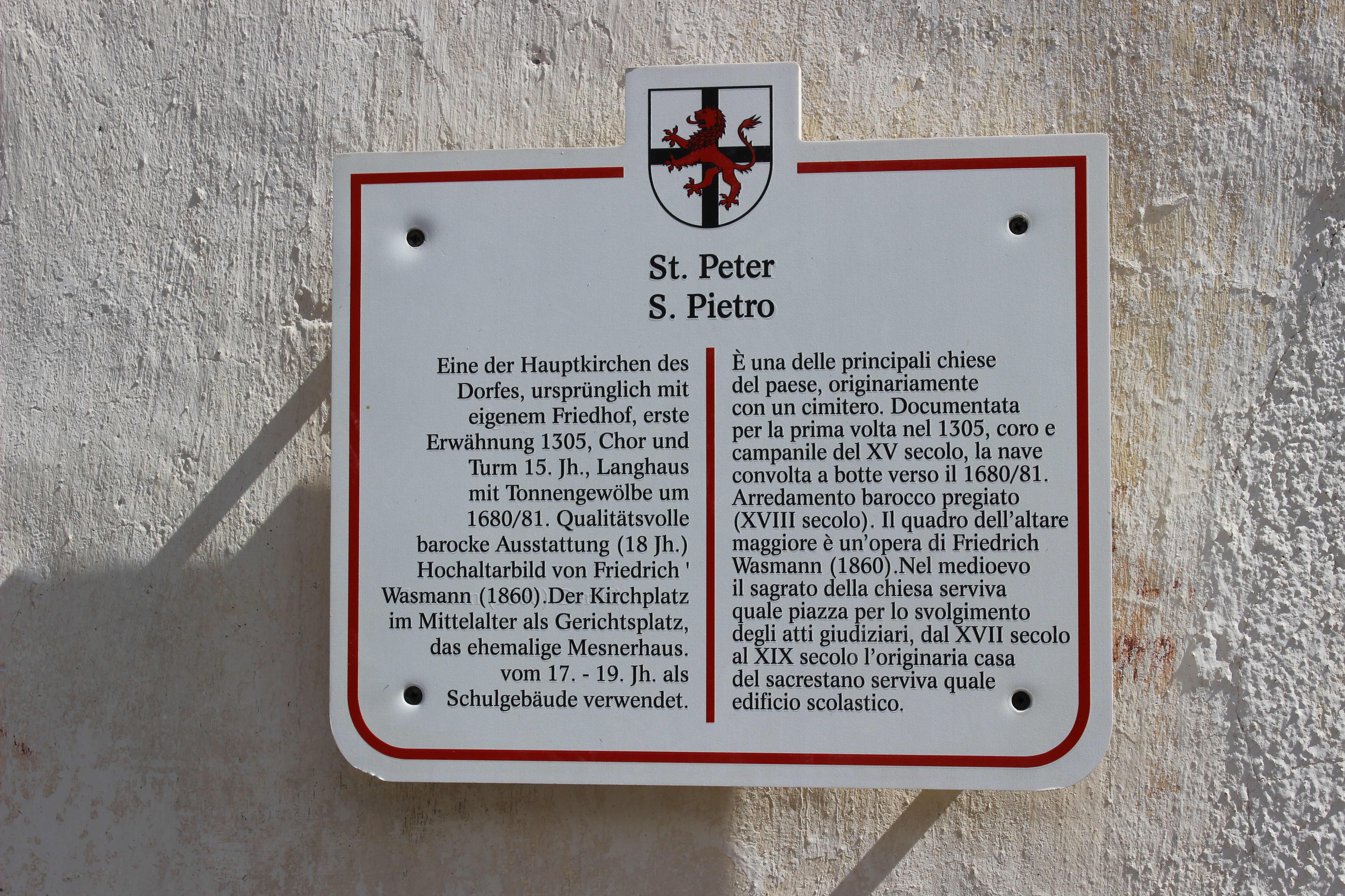 Erklärungstafel an St. Peter in Lana (Südtirol)